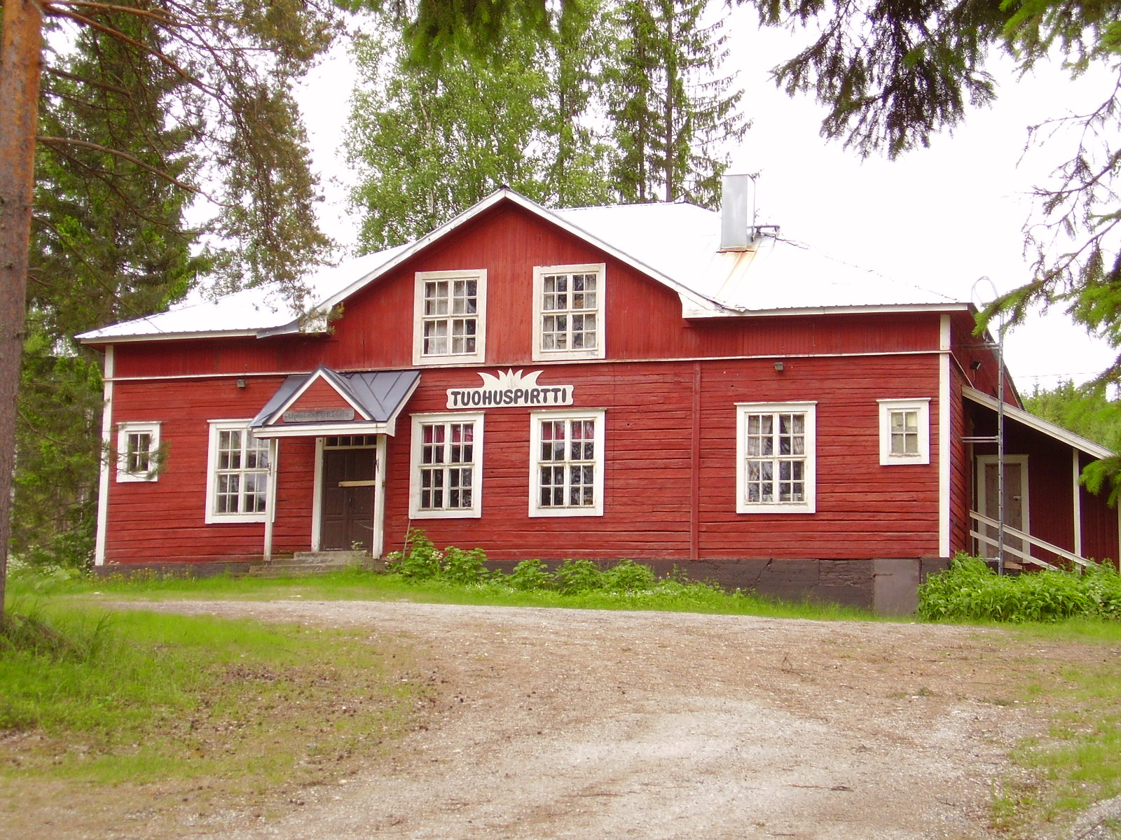 Tuohuspirtti Lipinlahdessa.